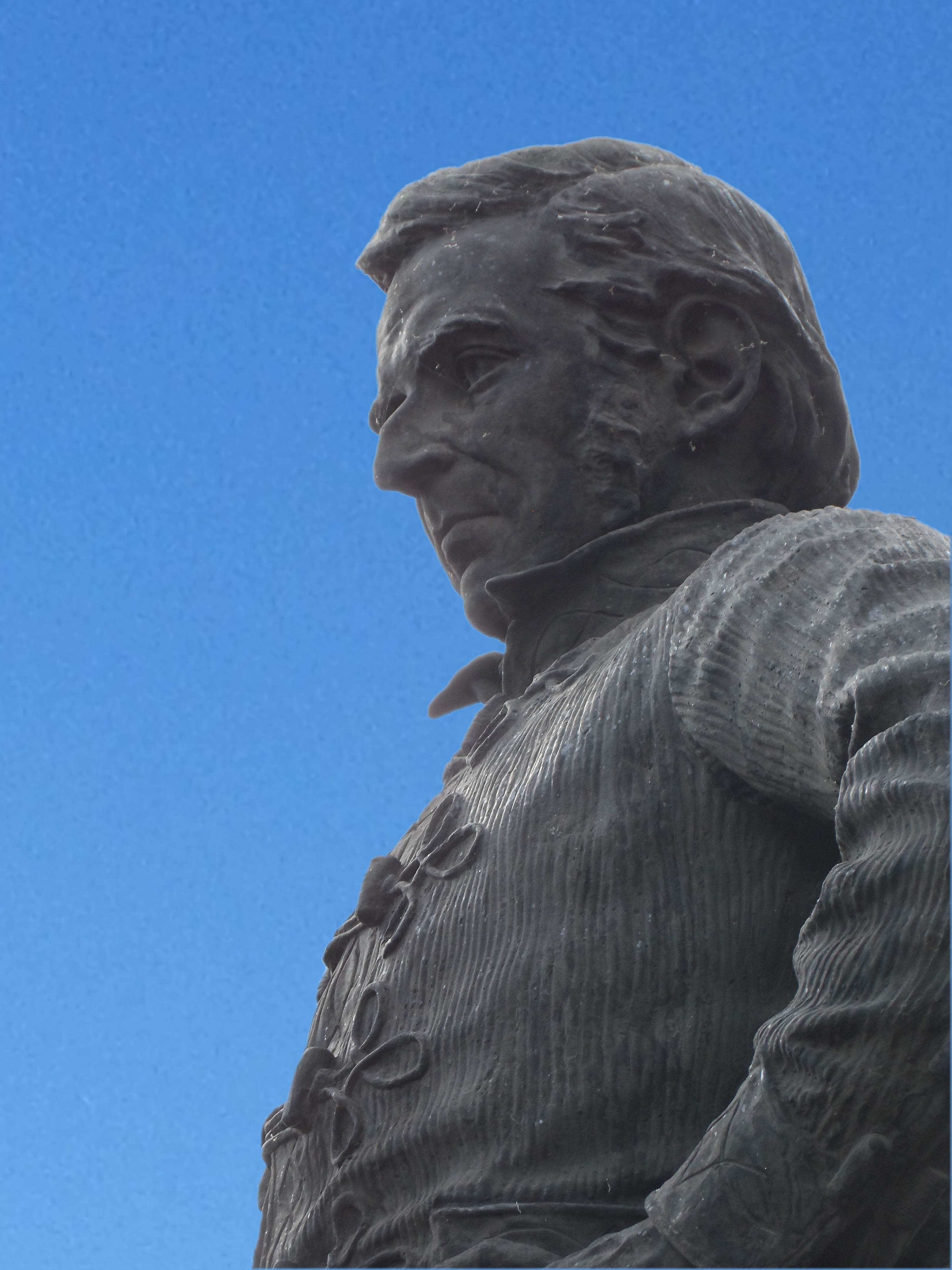 Vista lateral de la estatua ubicada en el Paseo de la Reforma, dedicada a Joaquín Miguel Gutierrez Canales, procer Chiapaneco.